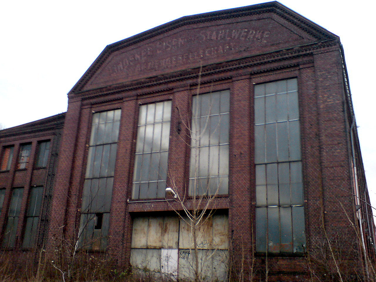 Erhaltene Halle der Lindener Eisen- und Stahlwerke, gesehen von der Davenstedter Straße aus.